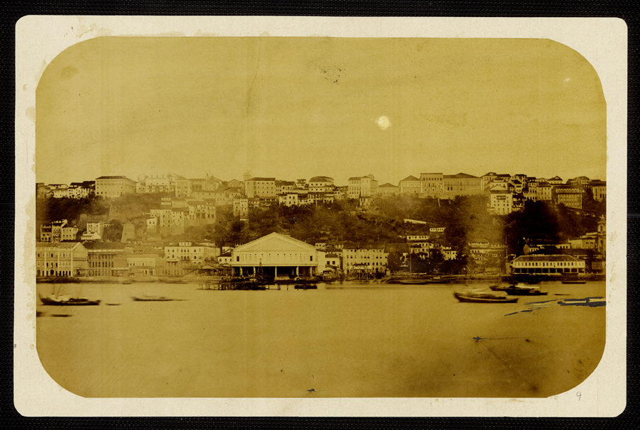 Vista da cidade de Salvador, no século XIX, antes da construção do Elevador Lacerda. O edifício da alfândega em destaque, onde hoje encontra-se o Mercado Modelo.